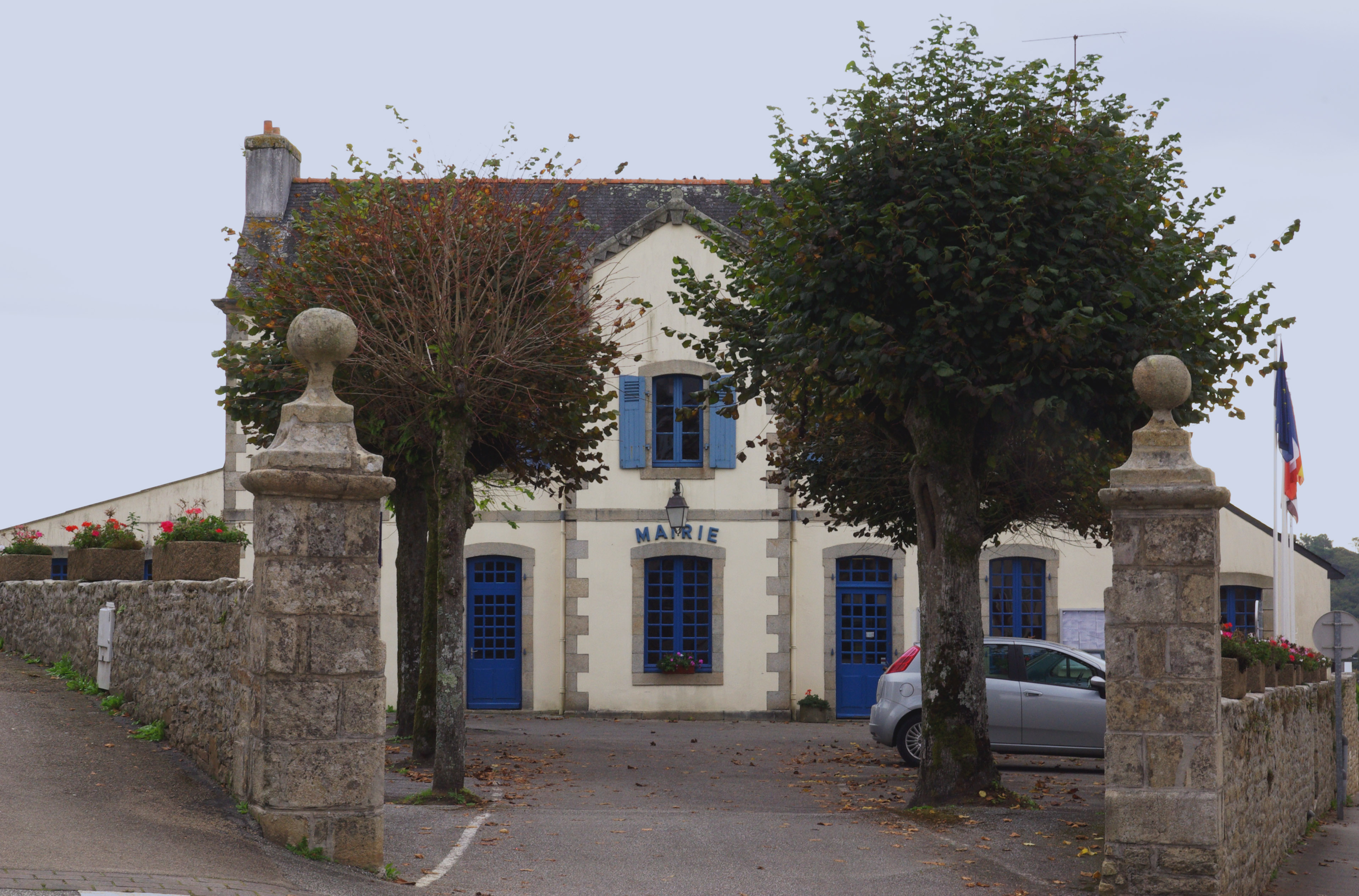 Mairie de Plogastel-Saint-Germain